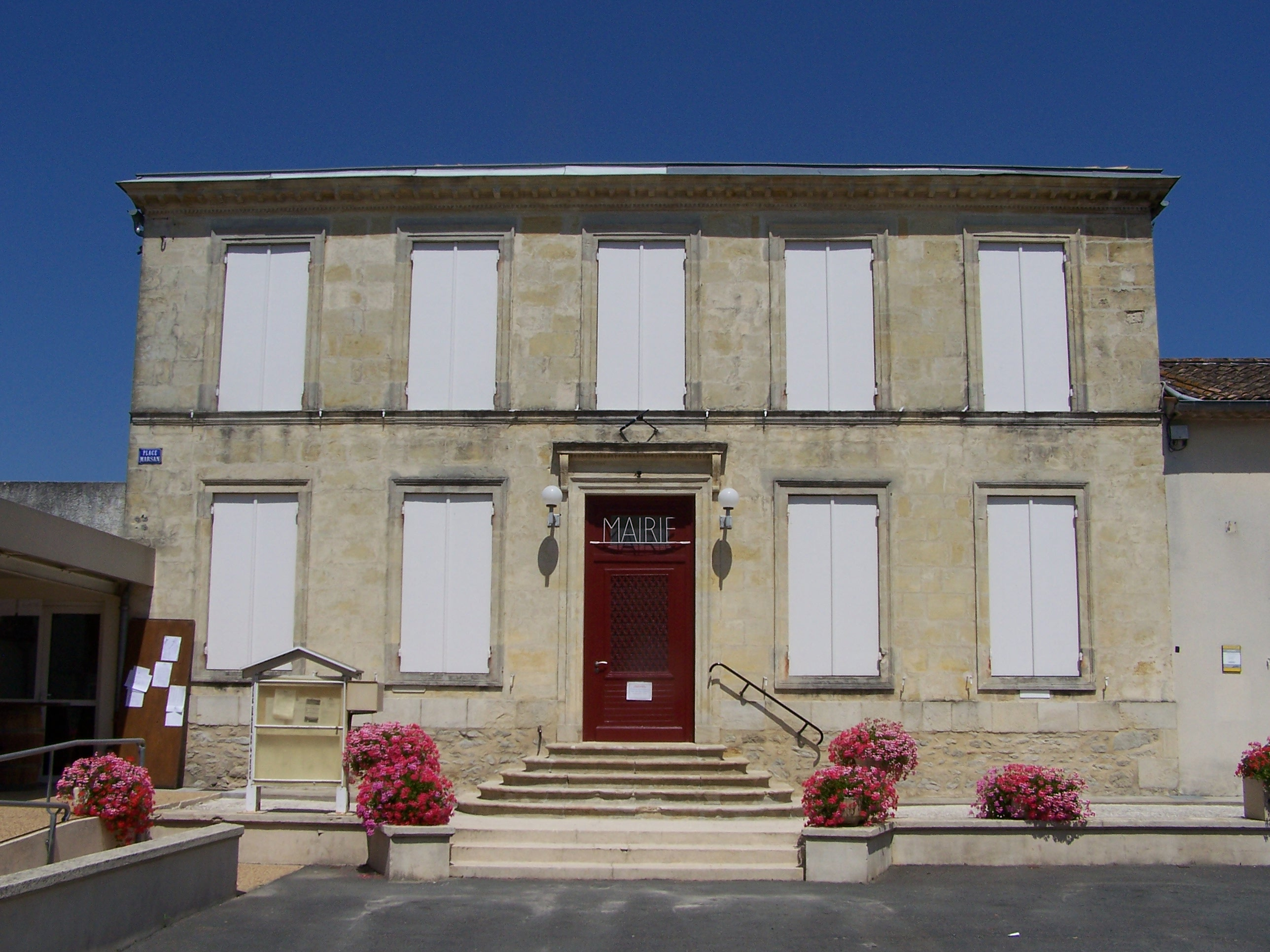 Mairie de Savignac, Gironde, France